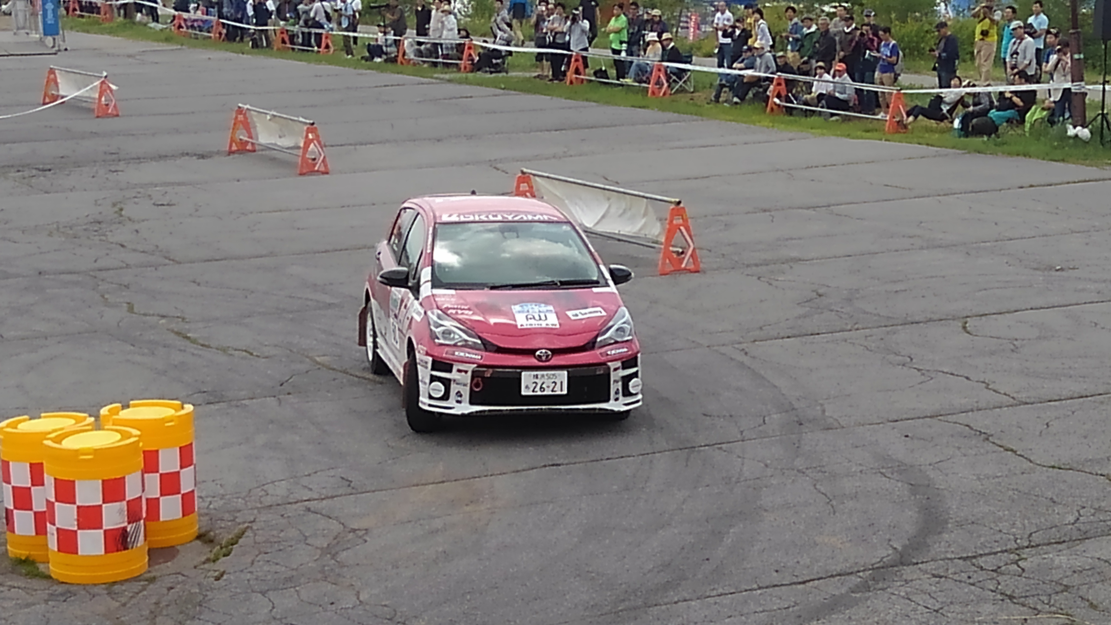 全日本ラリー選手権にて、いとうりな/竹岡静香組のトヨタ・ヴィッツ